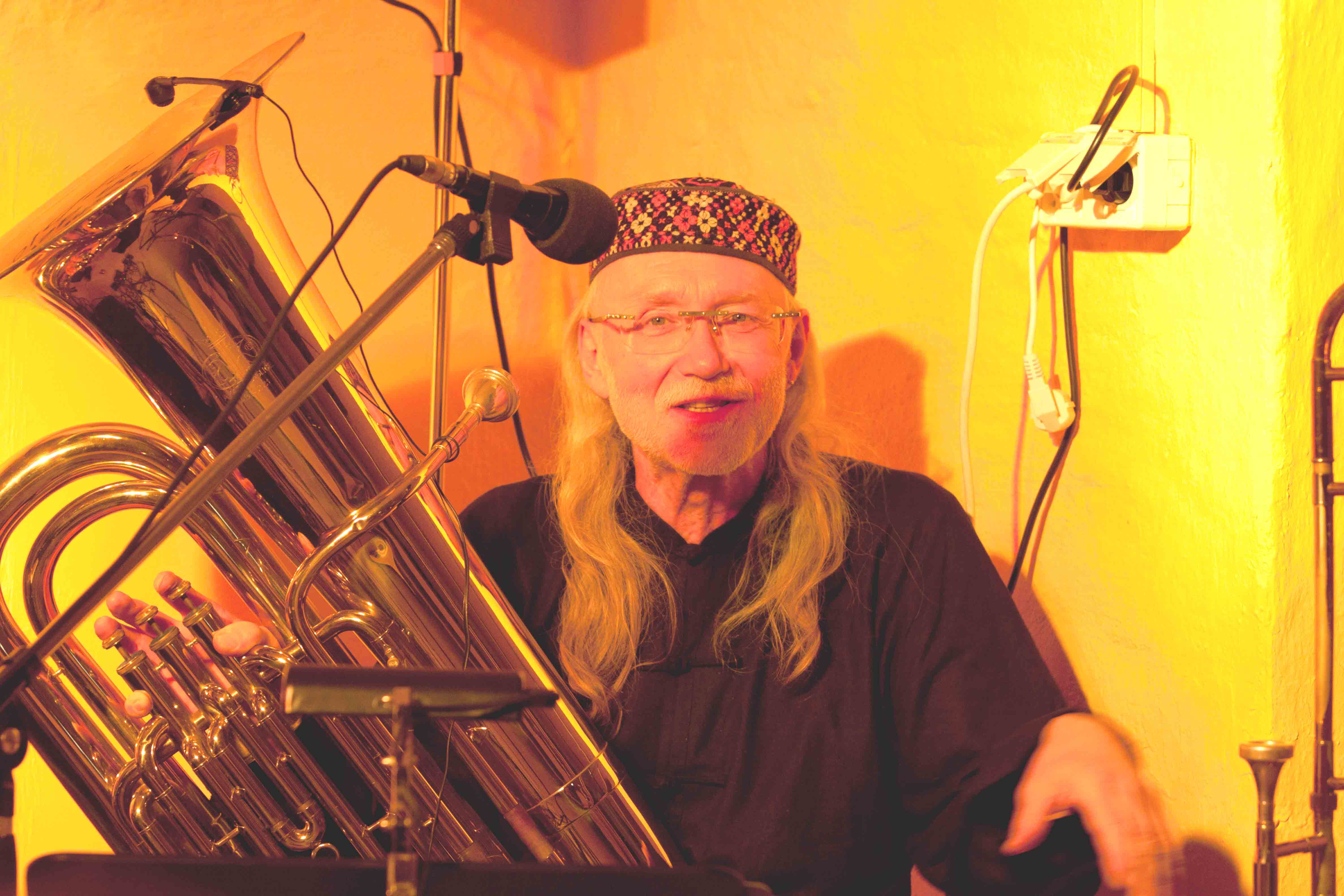 Trombone and tuba player Frieder W. Bergner